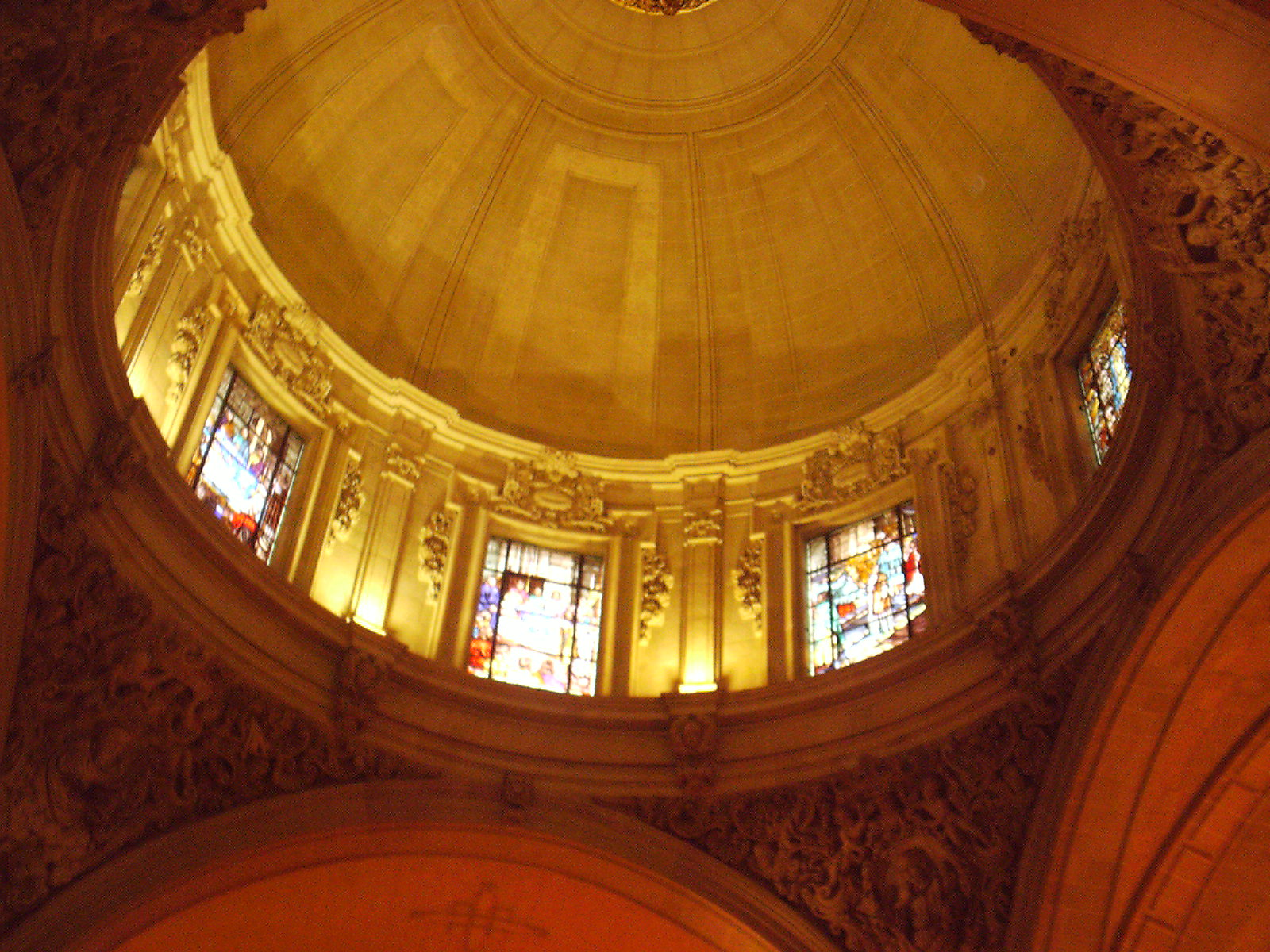 Cúpula de la Basílica Menor de Santa María de Elche